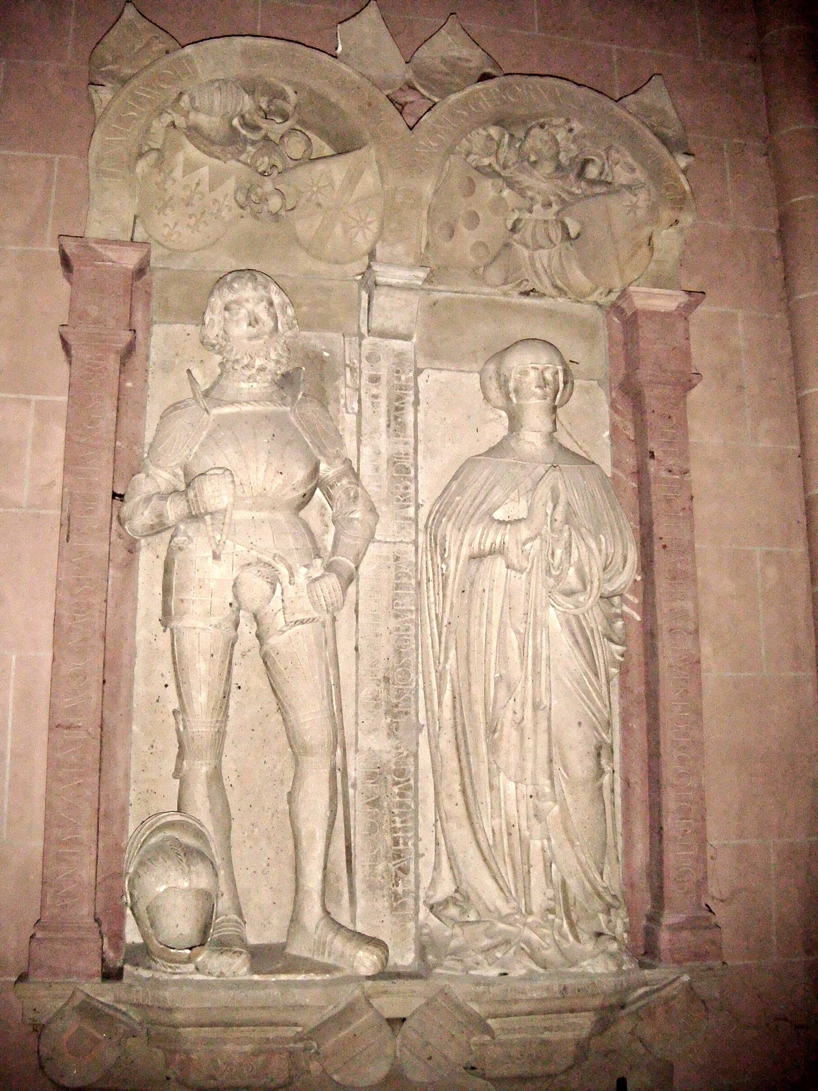 Wolfgang von Dalberg, auch Wolf der Lange von Dalberg (1473-1522), Epitaph Katharinenkirche Oppenheim